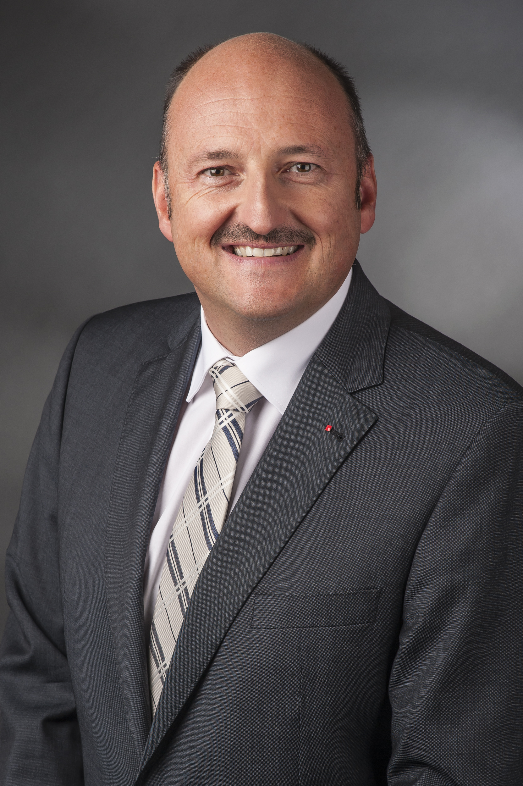 Bernd Rützel (* 2. Oktober 1968 in Gemünden am Main) ist ein deutscher Politiker und Abgeordneter im Deutschen Bundestag (SPD).